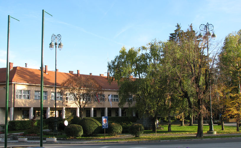 Sveti Ivan Zelina, središte grada i gradsko poglavarstvo